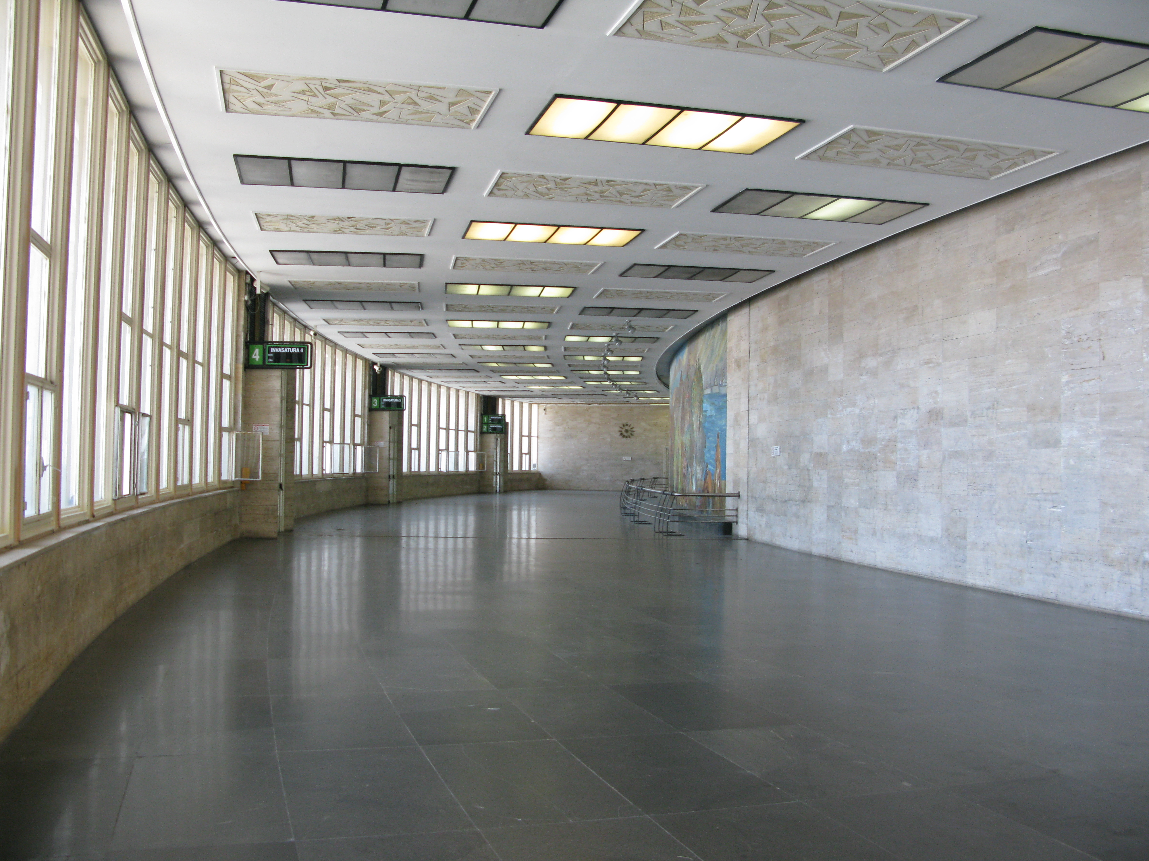 Salone dei Mosaici - Stazione di Messina Marittima - Messina Harbour, Italy